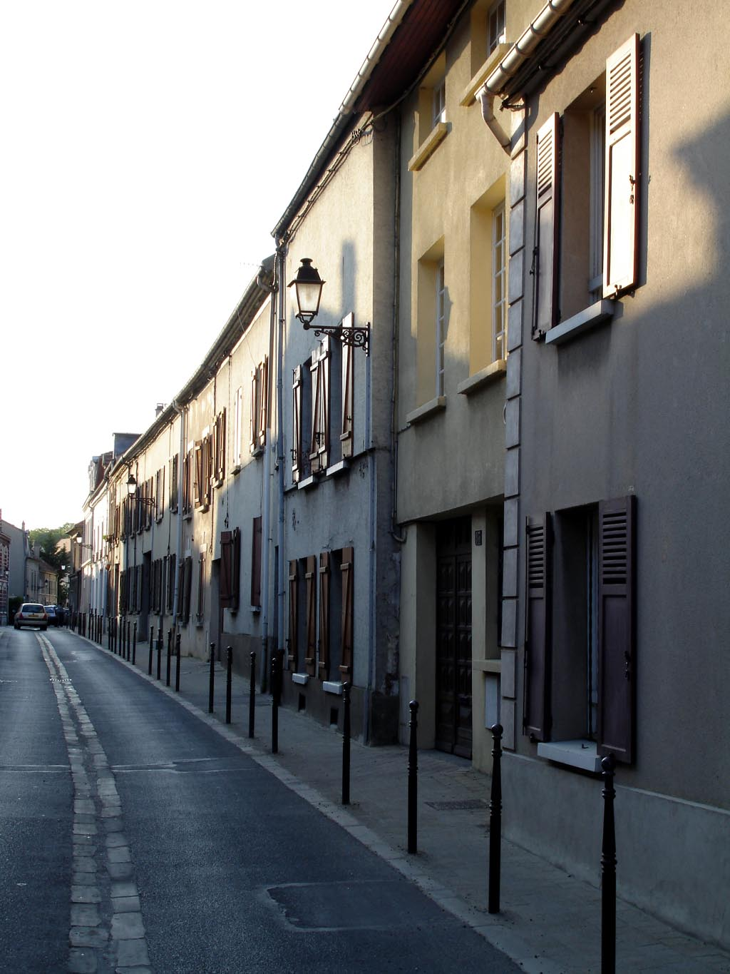 Rue Haute à Deuil-la-Barre (Val-d'Oise, France).